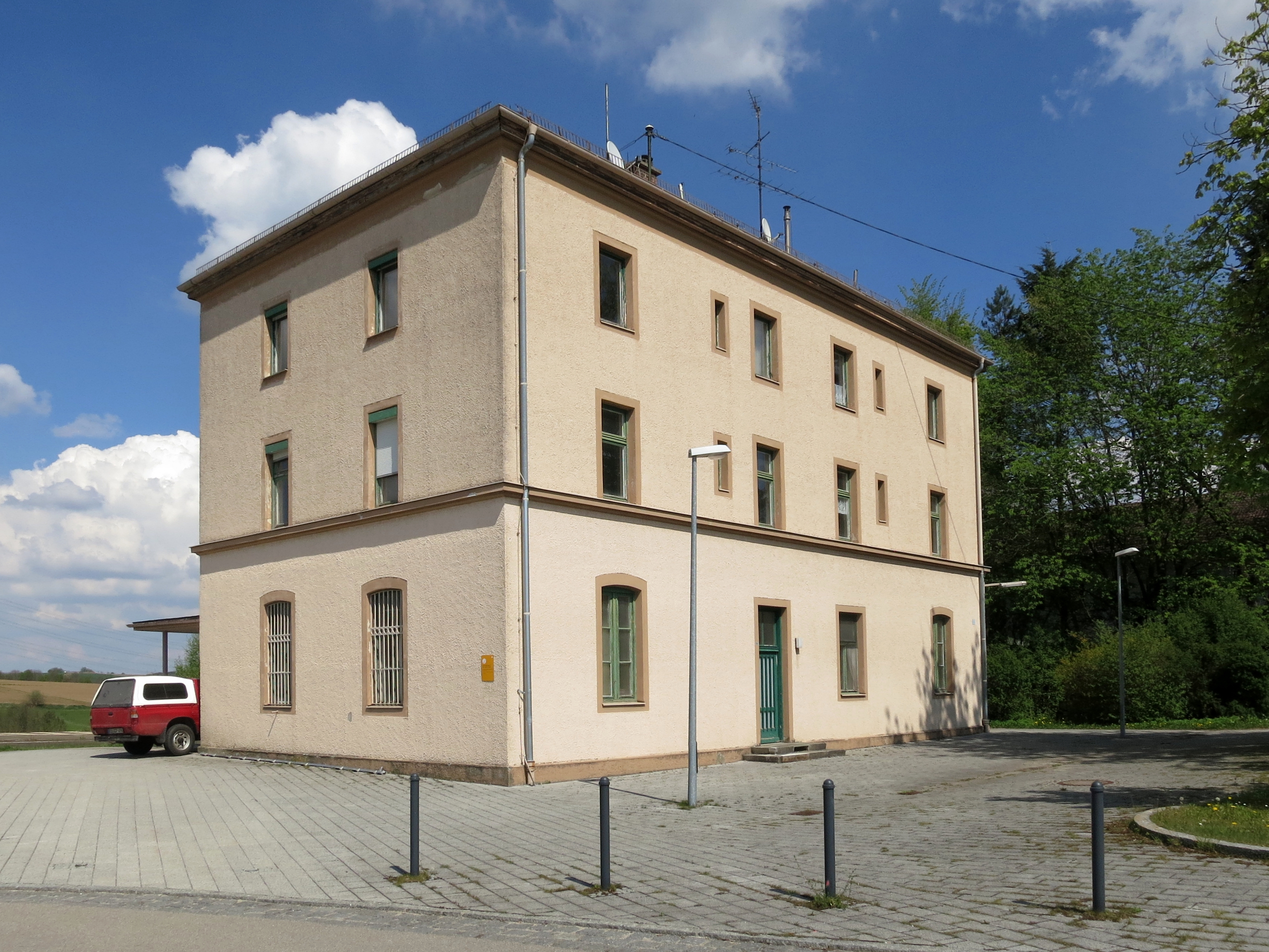 Empfangsgebäude des Bahnhofs Thann-Matzbach von der Straßenseite (Ansicht von Südwesten)